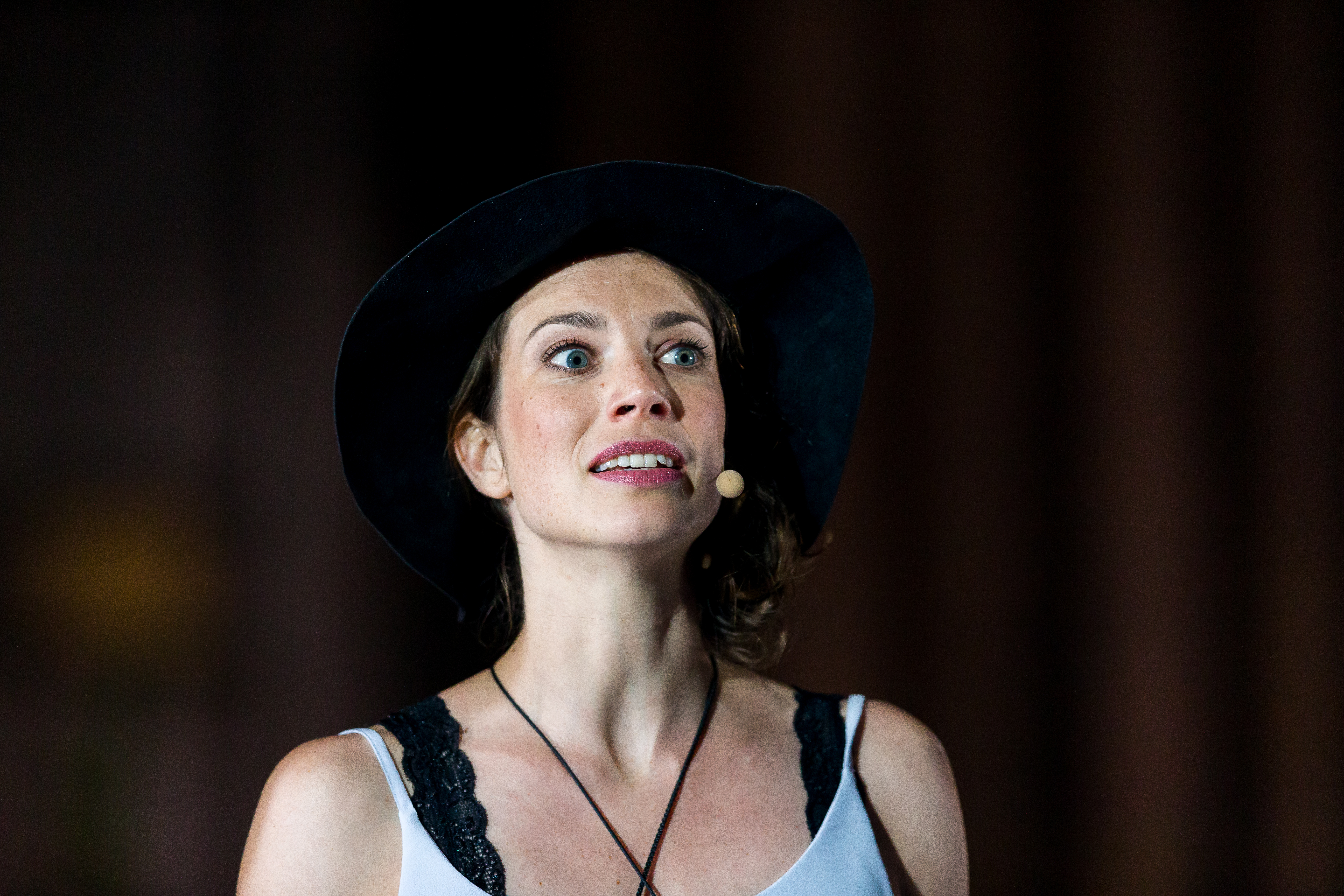 2016: Uraufführung: "GOLD. Der Film der Nibelungen" Regie: Nuran David Calis Autor: Albert Ostermaier Intendant: Nico Hofmann --- Ensemble: Produzent Konstantin Trauer: Uwe Ochsenknecht Regisseur Arsenij Kubik: Vladimir Burlakov Drehbuchautor Charlie P. Weide: Josef Ostendorf Society Reporter Peter Scheumer: Dominic Raacke Kamerafrau "the eye": Anna Rot Setdesignerin "set": Joy Maria Bai Assistentin des Produzenten Carmen: Alexandra Kamp Maskenbildnerin Sueyla Blume : Ayse Bosse die Ältere Kriemhild Karina Bergmann: Katja Weitzenböck die Jüngere Kriemhild Simone Gehel: Constanze Wächter die Ältere Brünhild Lotte Jünger: Michaela Steiger die Jüngere Brünhild Nathalie Aurun: Dennenesch Zoudé Siegfried Mohamad Söder: Ismail Deniz Hagen René Inner: Sascha Göpel Gunther Klaus Castel: Maximilian Laprell Bürgermeister Franz Koppoler: Heiner Lauterbach during Nibelungenfestspiele "GOLD. Der Film der Nibelungen" at Wormser Kaiserdom, Worms, Rheinland Pfalz, Germany on 2016-07-12, Photo: Sven Mandel